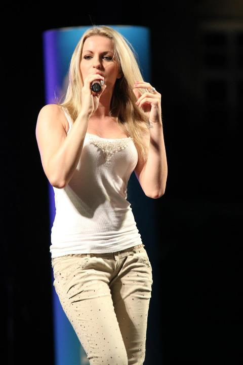 Gabriela Gunčíková na módní přehlídce ve Znojmě (28. srpna 2011)